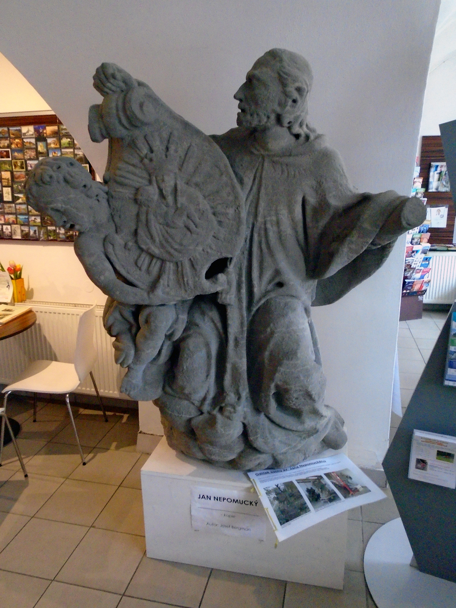 Kopie sochy (tzv. výdusek) z roku 1965. Nyní je umíštěna v Infocentru na Jiřího náměstí.